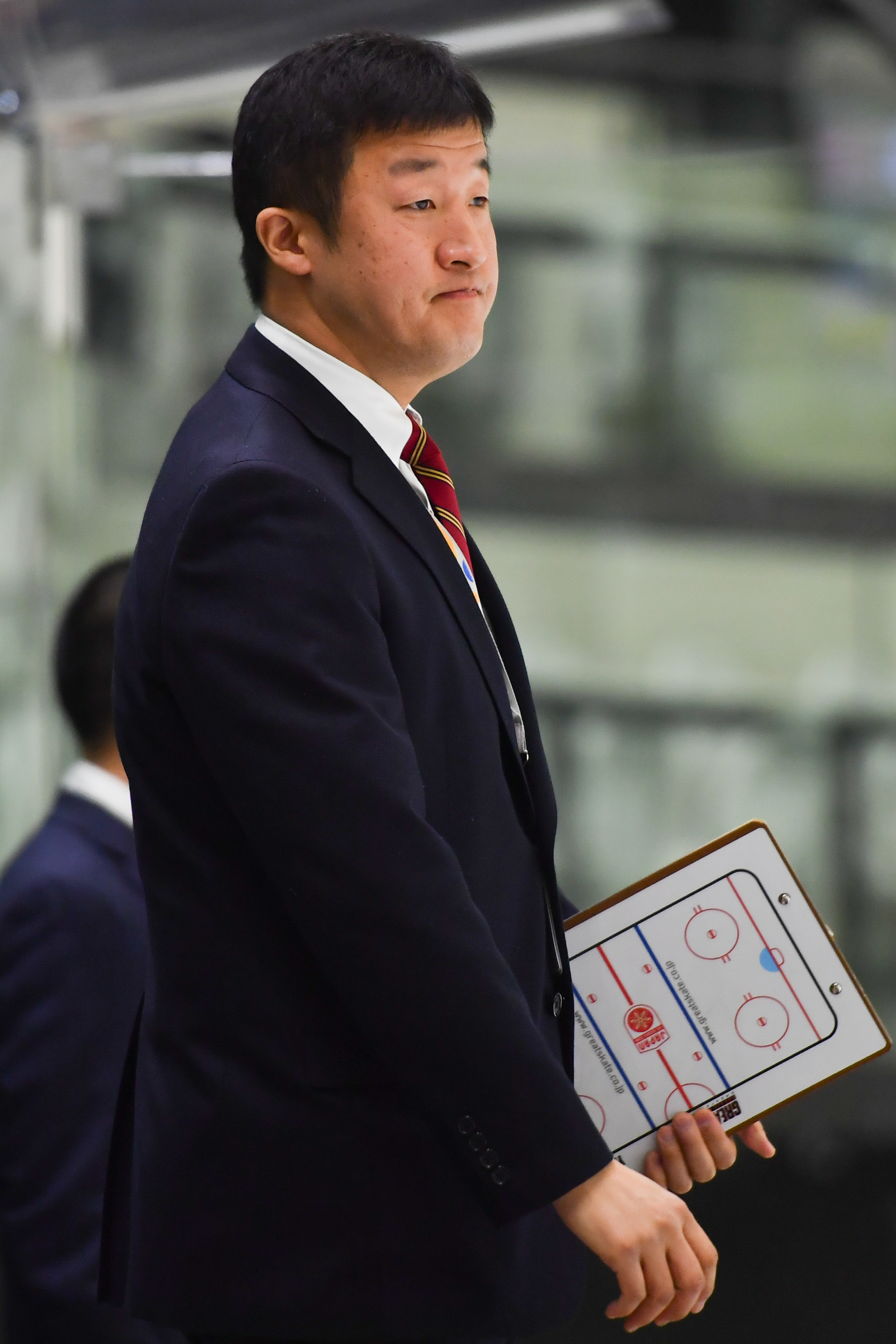 IIHF Eishockey Damen Weltmeisterschaft Division IA am 16. April 2017 in Graz.Bild zeigt Head Coach Takeshi Yamanaka (JPN).